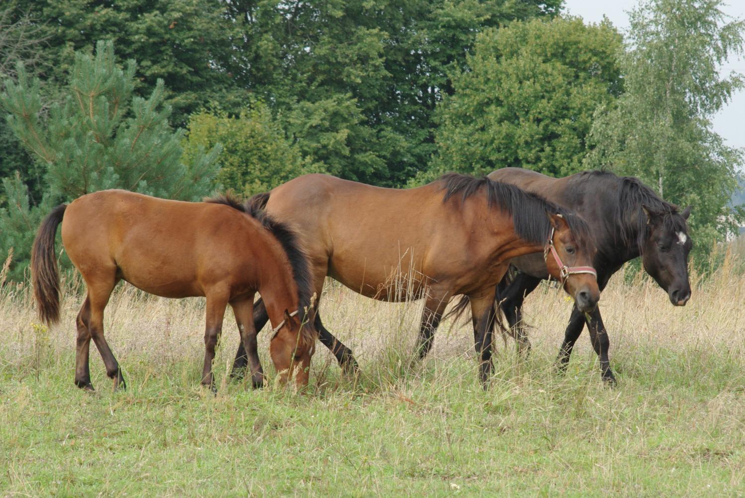 Pferderasse Žemaitukai: Fohlen Kaštonė 2008, Stute Kaskada 1987, Hengst Kankorėžis 2005